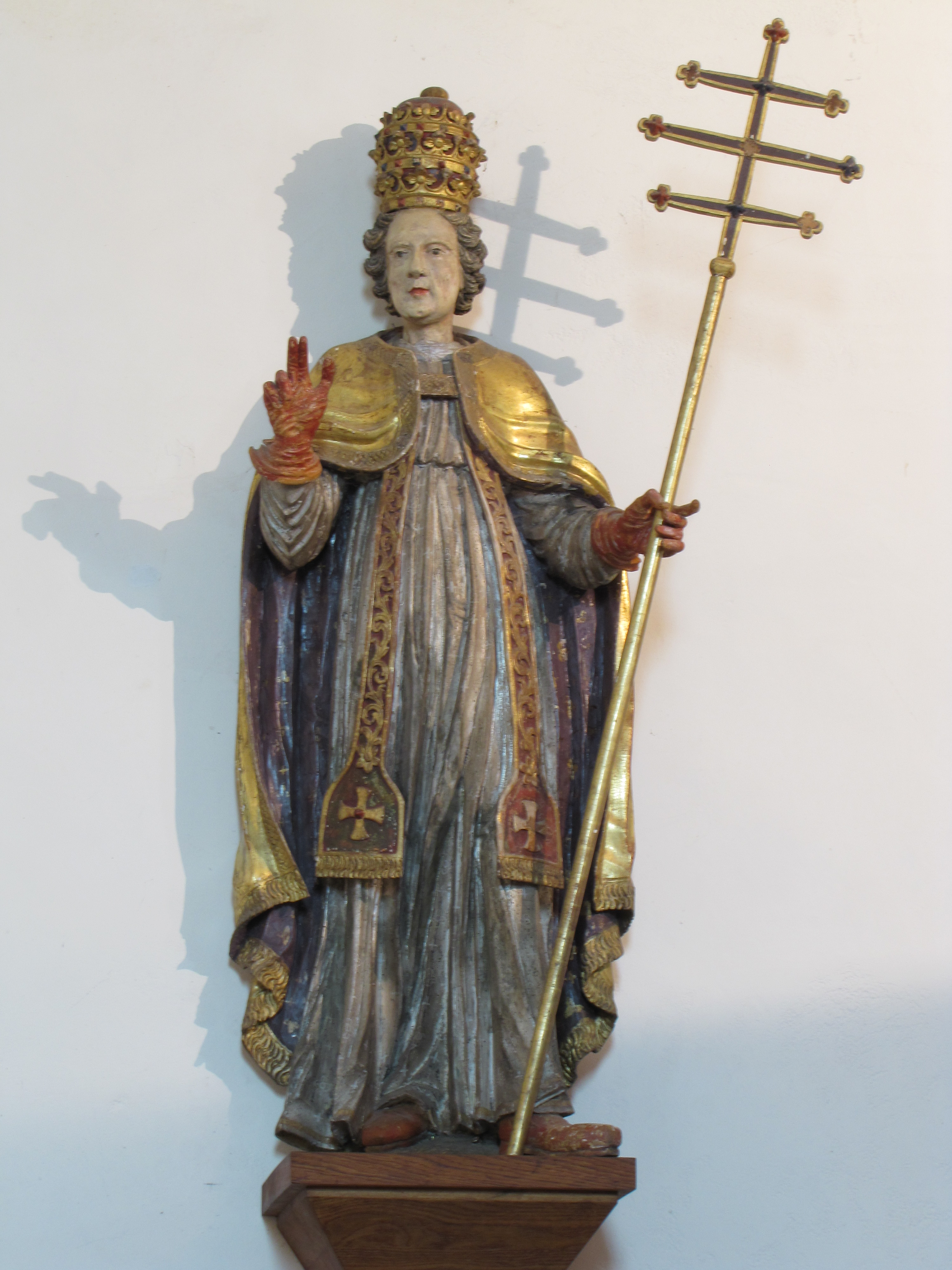 Alsace, Haut-Rhin, Église abbatiale Saint-Léger (XIIe) de Murbach (PA00085554, IA00054802, IA00054801). Statue du pape Saint-Corneille (XVIIe-XVIIIe): This object is classé Monument Historique in the base Palissy, database of the French furniture patrimony of the French ministry of culture, under the references PM68000252 and IM68000488.